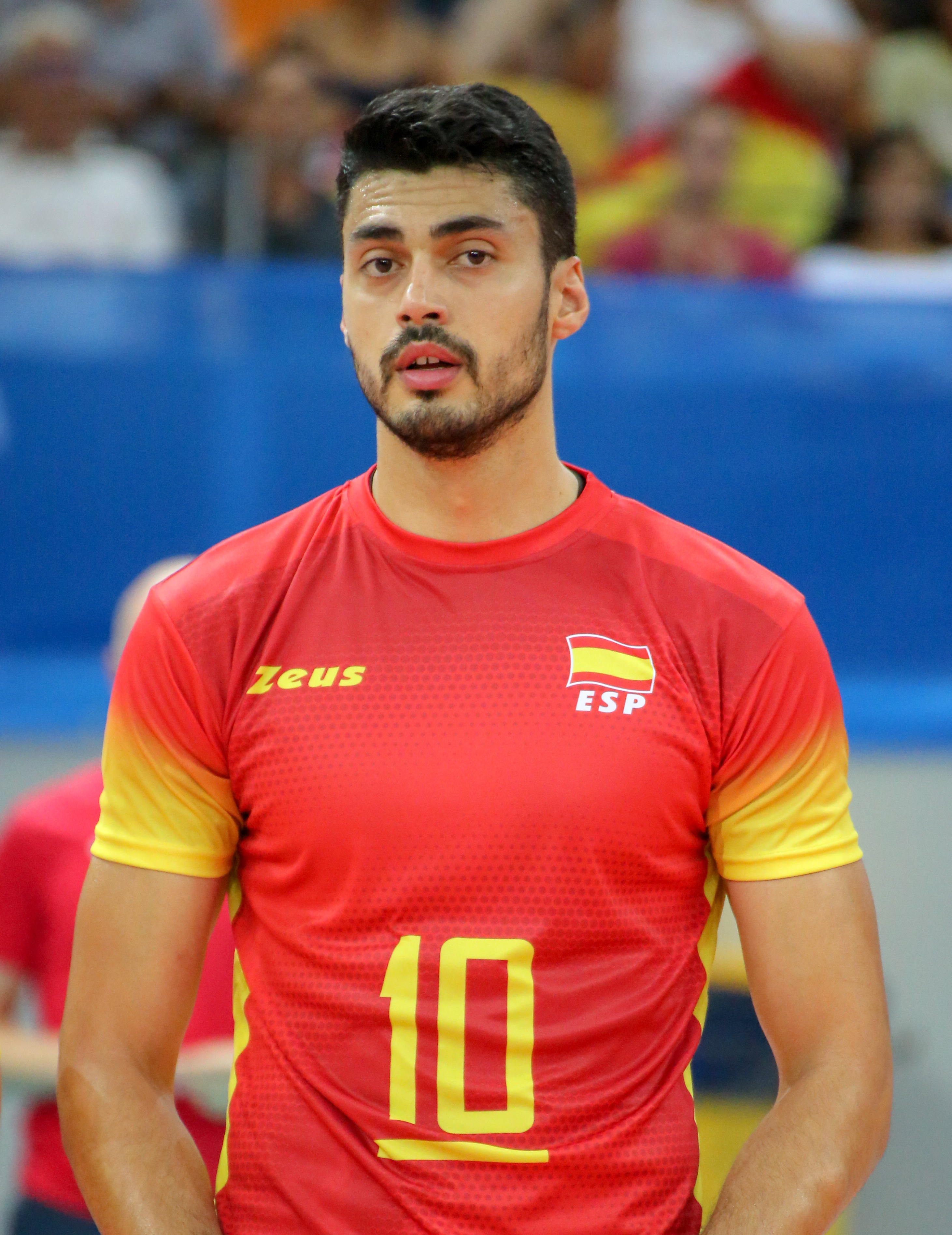 Jorge Fernández Valcarcel - Juegos del Mediterráneo 2018